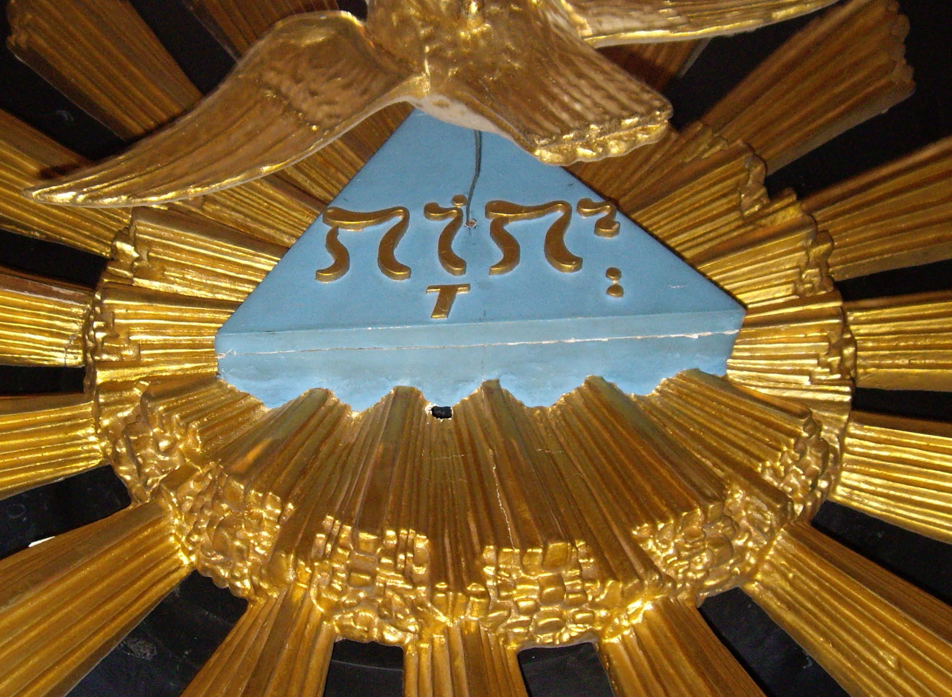 Predikstolens tak med tetragrammet JHWH i Heliga Trefaldighets kyrka, Kristianstad